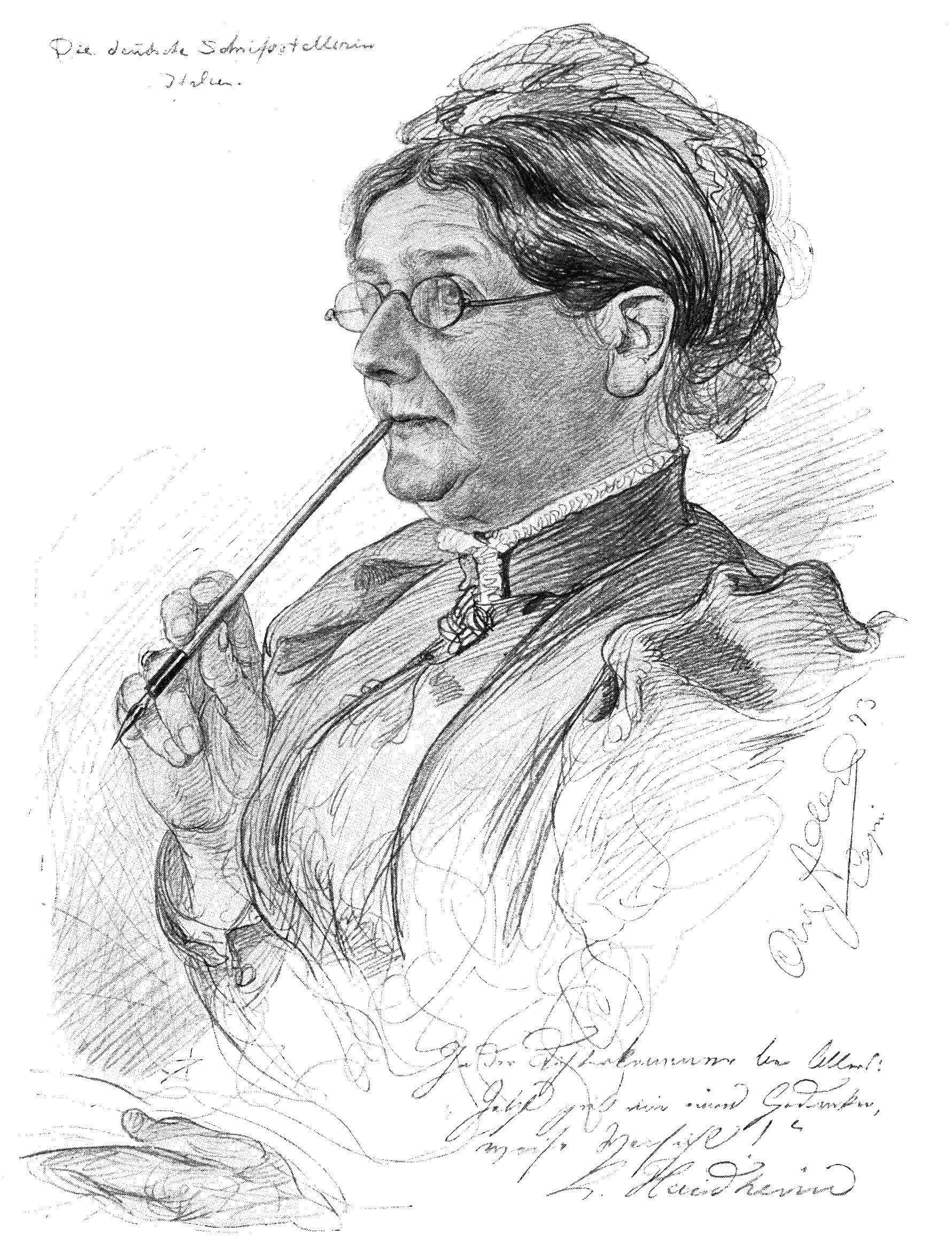 Porträt der Schriftstellerin Luise Ahlborn (Pseudonym: Luise Haidheim)